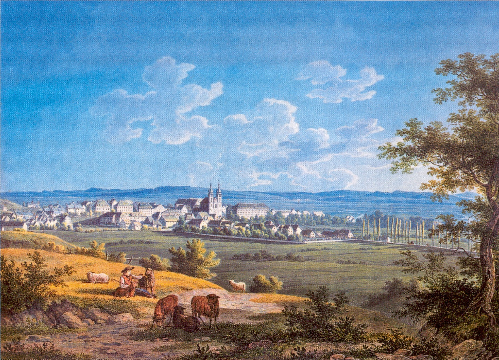 Residenzstadt Donaueschingen Aquarell